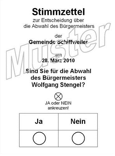 Stimmzettels zur Abwahl des Bürgermeisters der Gemeinde Schiffweiler, Ludwig Frank.